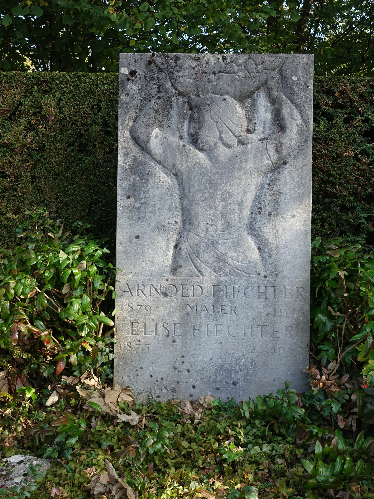 Grab von Arnold Fiechter (1879–1943) und seiner Schwester Elise Fiechter (1875–1962) auf dem Friedhof am Hörnli